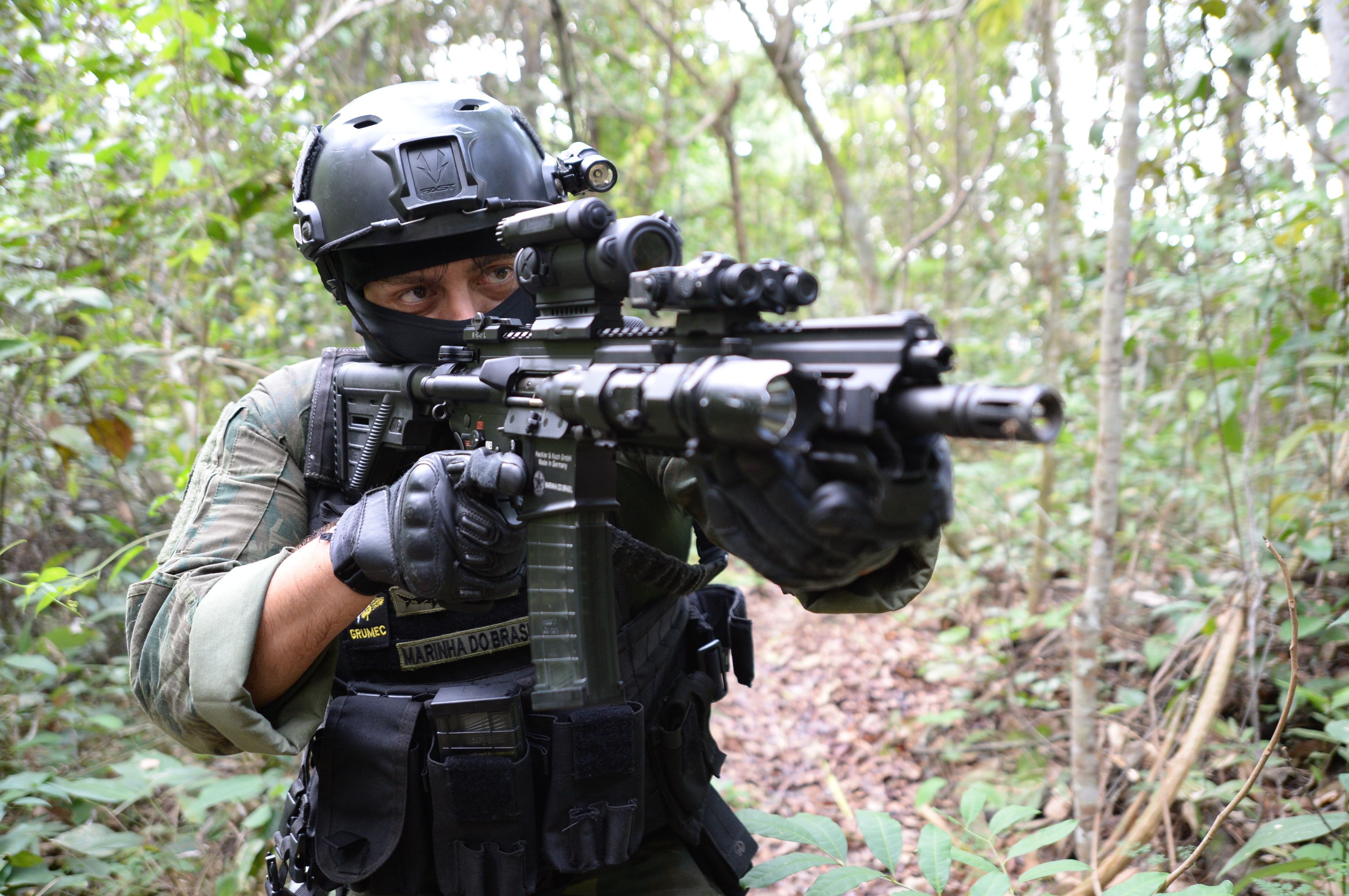 14/10/2014, Manaus - AM Fotos: Jorge Cardoso